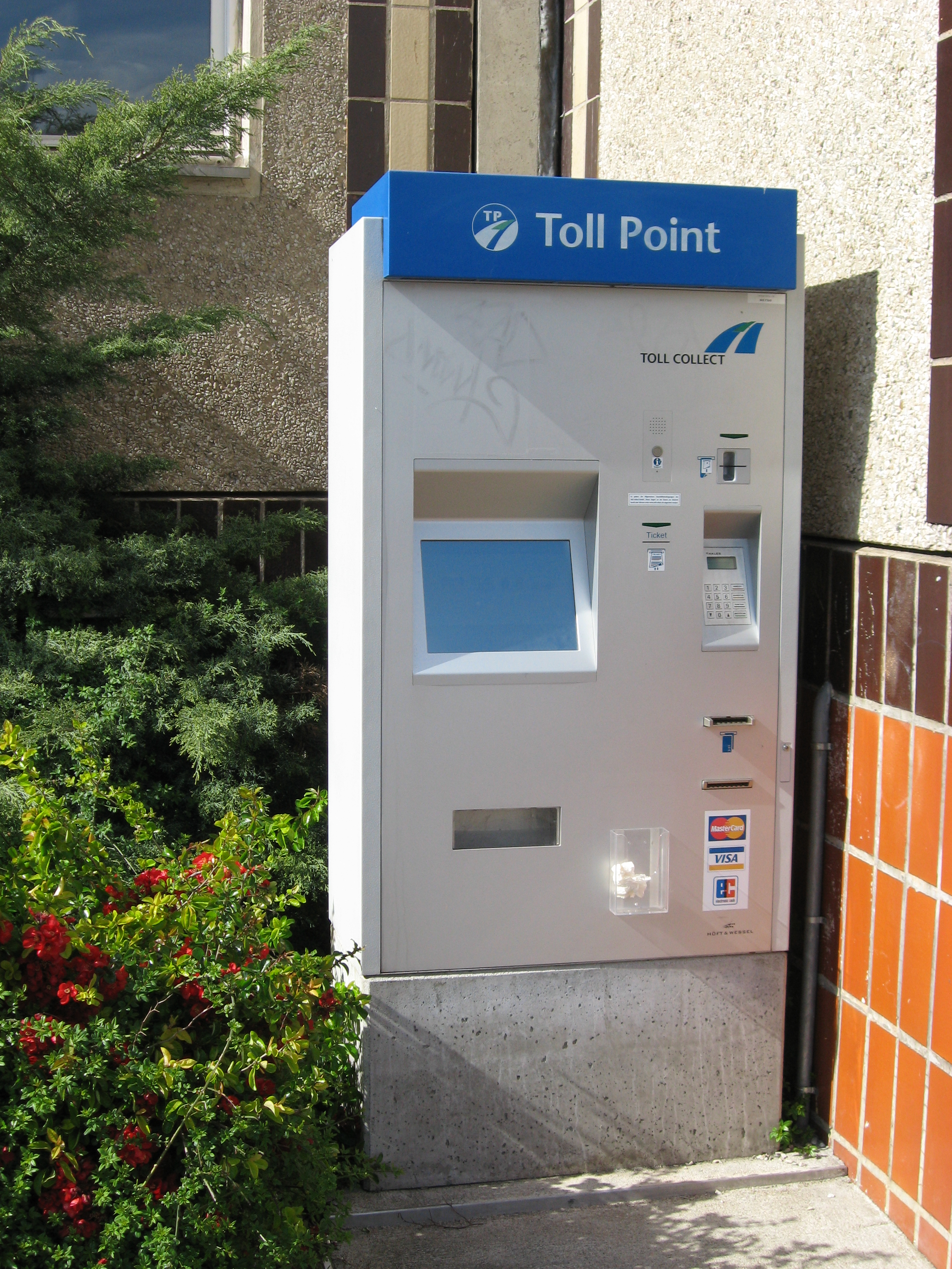 Automat zum Bezahlen der Autobahnmaut in Deutschland; aufgestellt in Berlin am Schiffbauerdamm (zwischen Stadtbahn und Luisenstraße) vor dem Haus des Bundesamtes für Güterverkehr